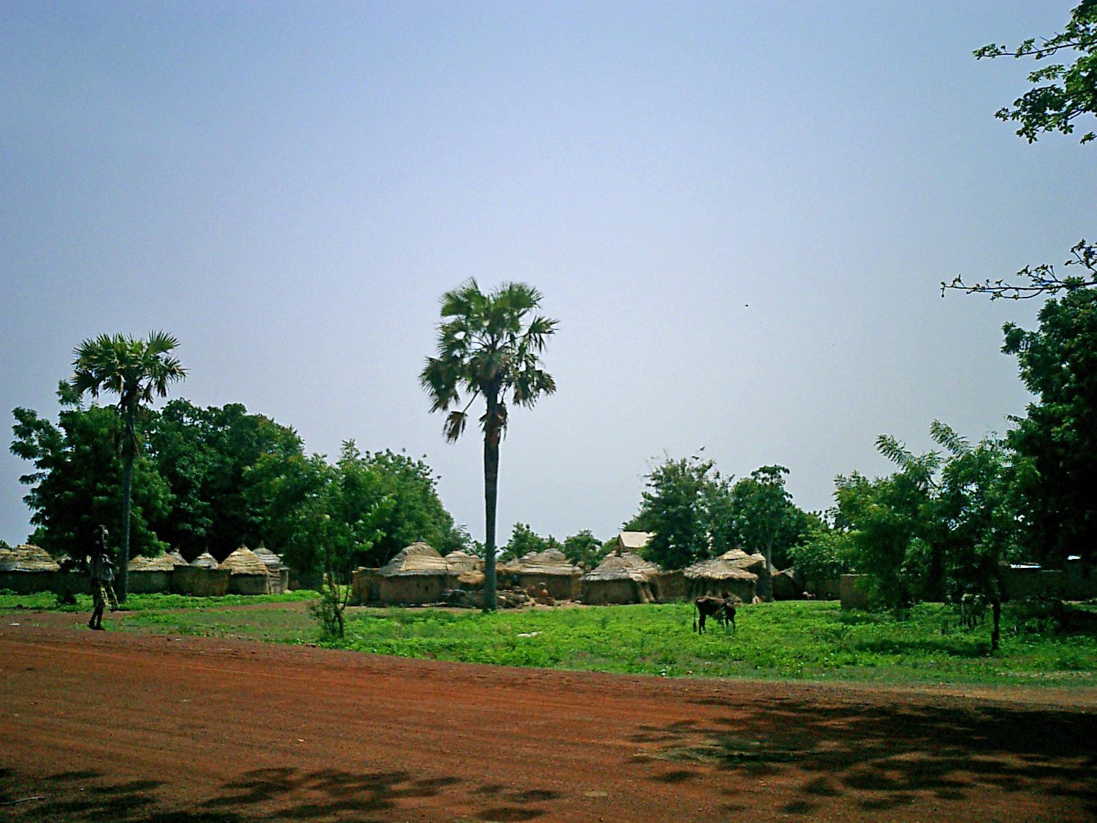 Burkina Faso: Nationalstraße 17